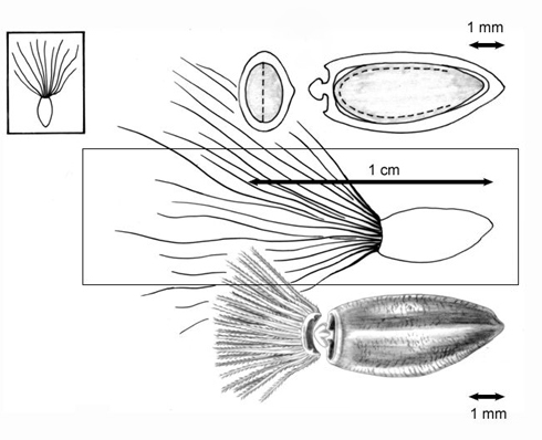 Carduus carpetanus : Cipselas